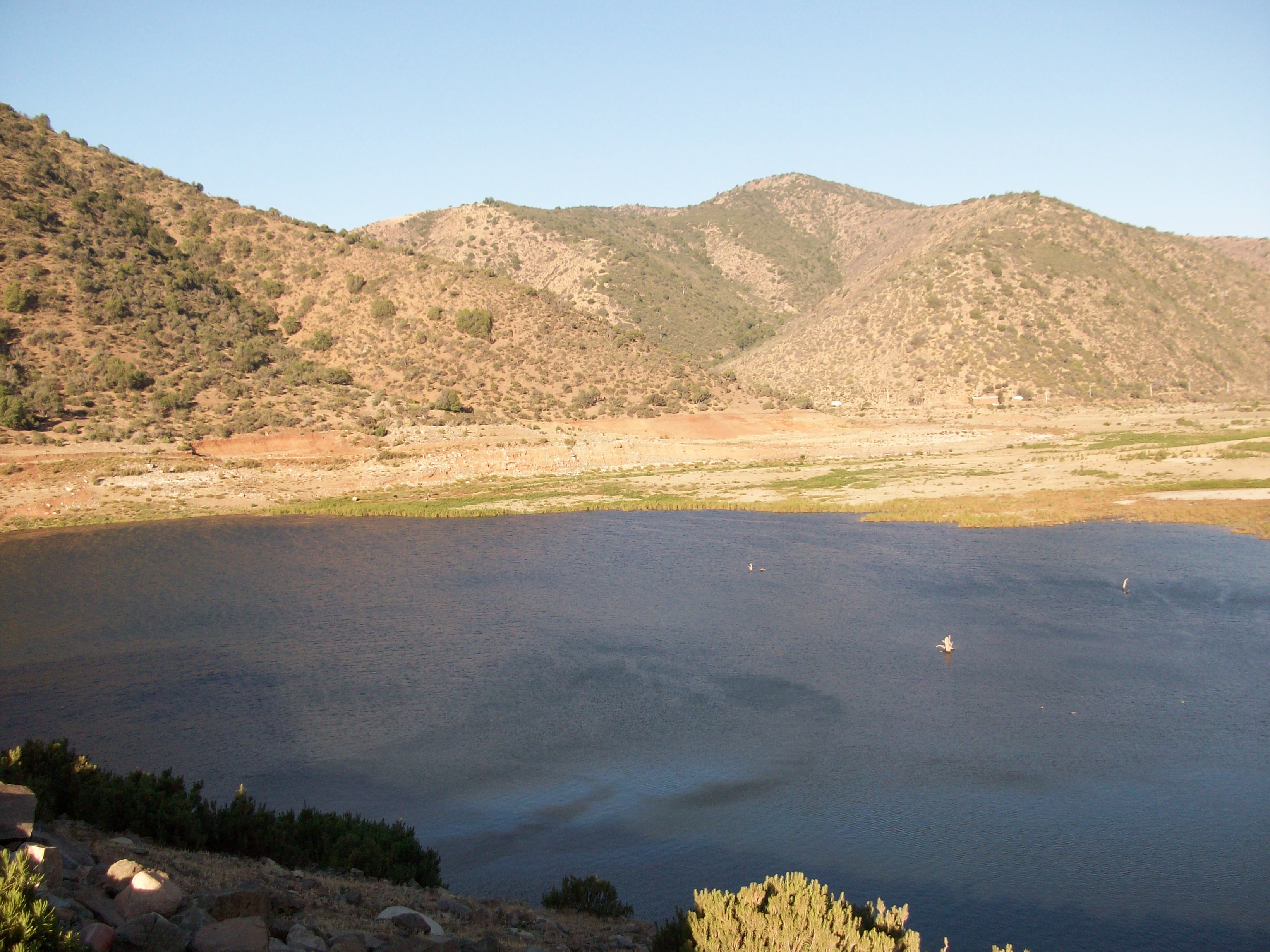 Ruta Tilama-Pichidangui, Región de Coquimbo, Chile